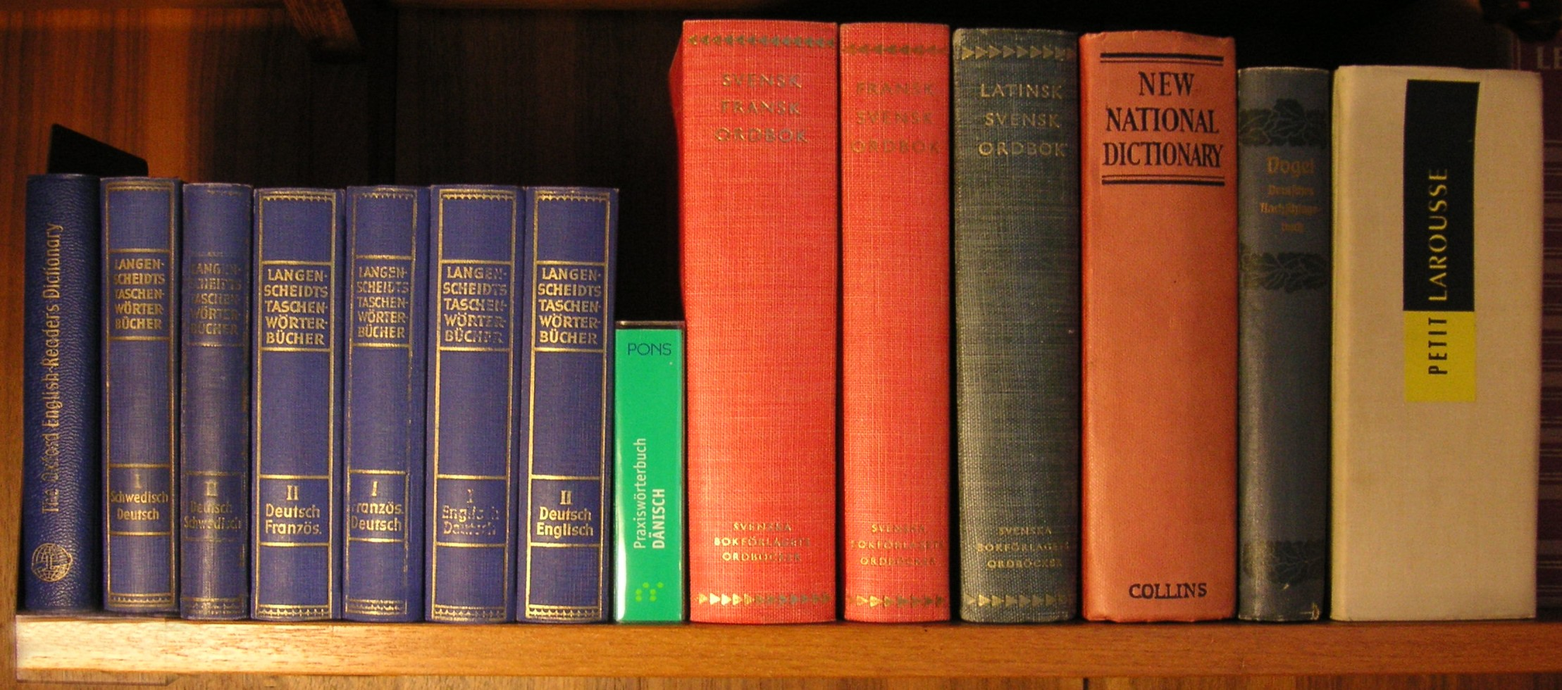 Wörterbücher